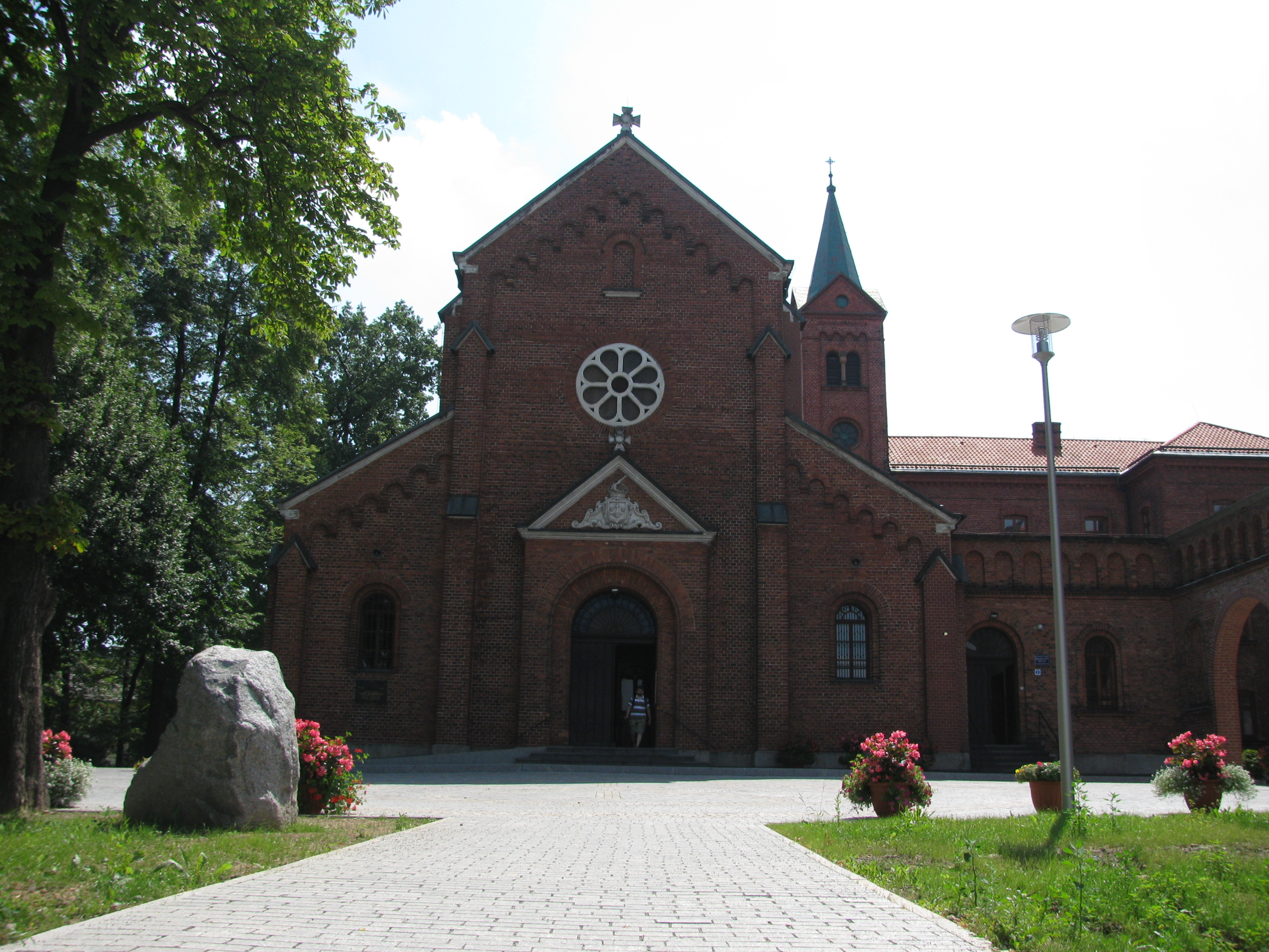 kościół p.w. Św. Józefa przy klaszt. OO. Karmelitów Bosych, Wadowice